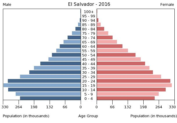 A population pyramid illustrates the age and sex structure of a country's population and may provide insights about political and social stability, as well as economic development. The population is distributed along the horizontal axis, with males shown on the left and females on the right. The male and female populations are broken down into 5-year age groups represented as horizontal bars along the vertical axis, with the youngest age groups at the bottom and the oldest at the top. The shape of the population pyramid gradually evolves over time based on fertility, mortality, and international migration trends.